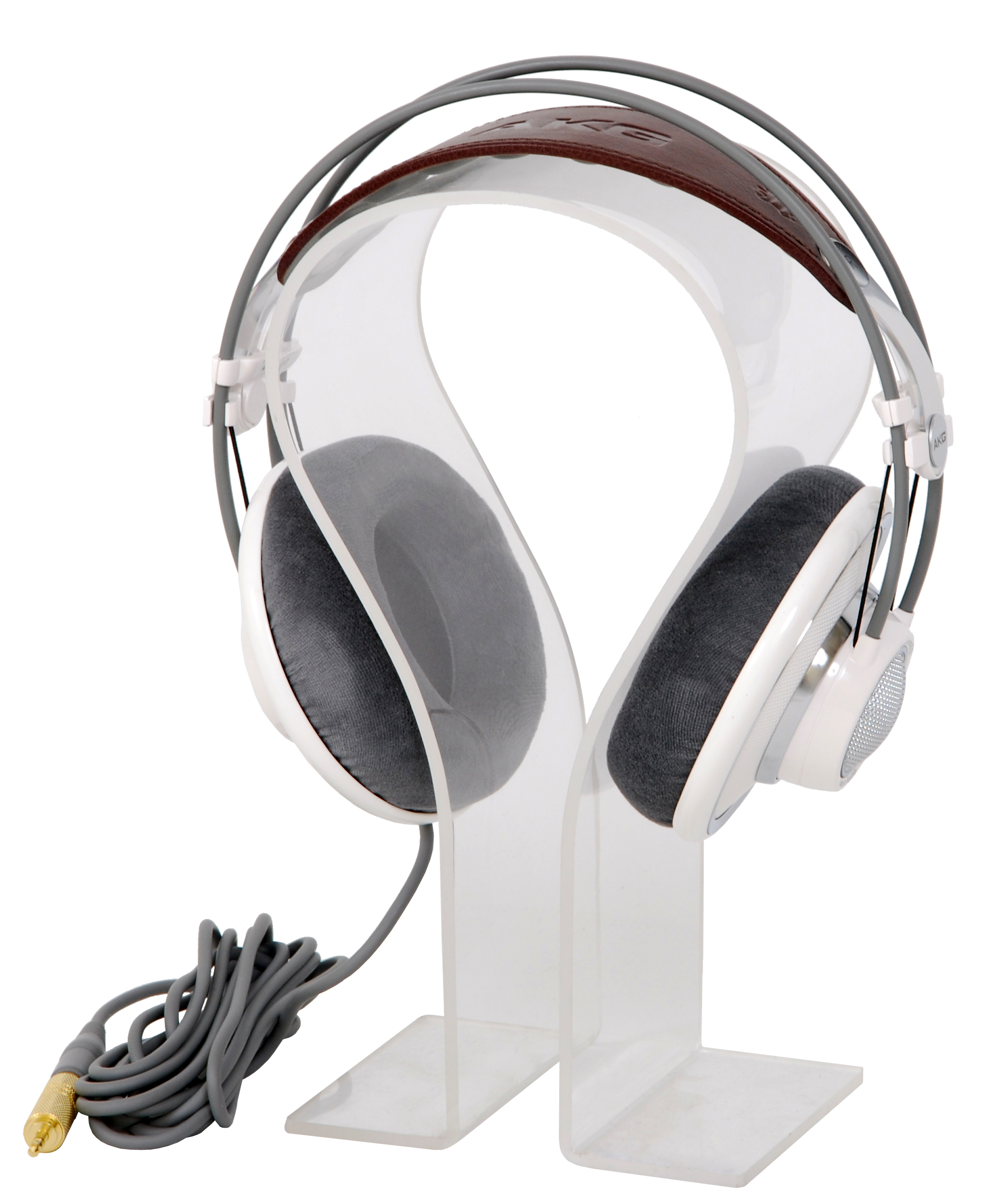 Słuchawki referencyjne K-701 firmy AKG